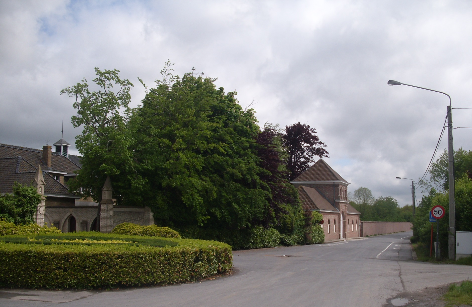 Sixtusabdij - West-Vleteren - Vleteren - West-Vlaanderen - België